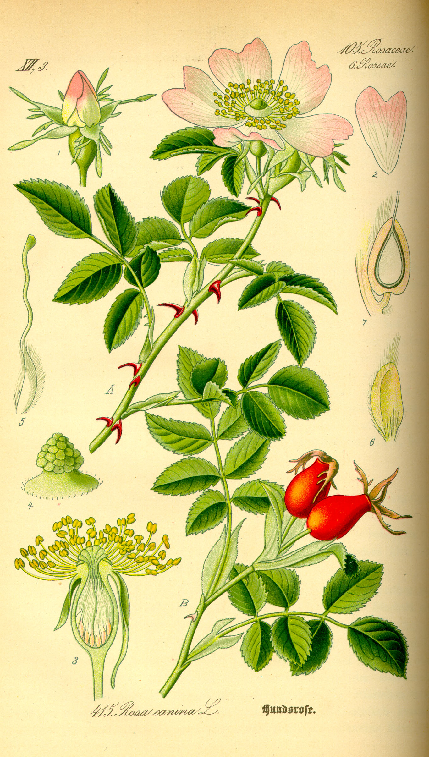 Rosa canina